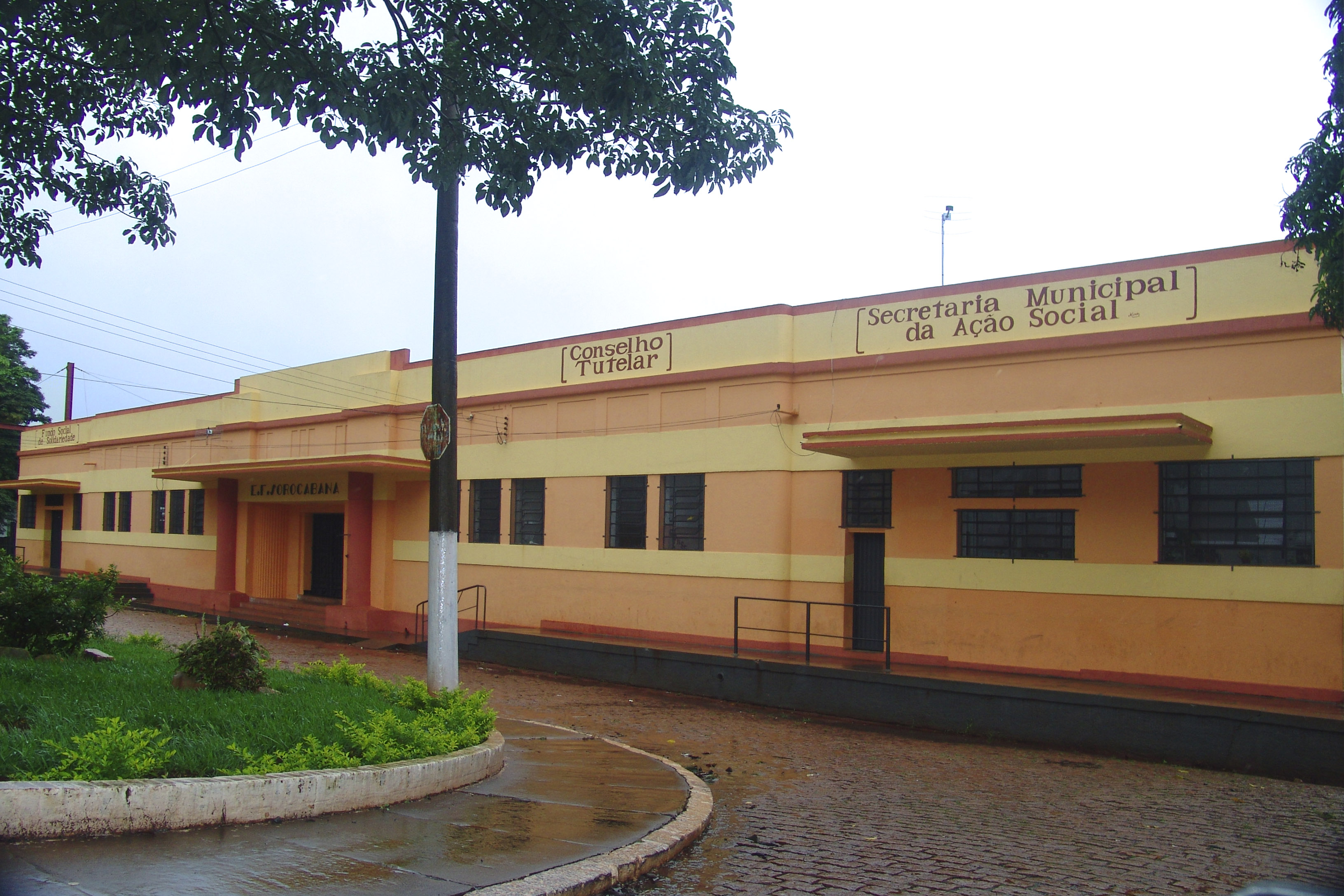 Antiga estação ferroviária (EFS) no município de W:pt:Bernardino de Campos, hoje secretarias municipais